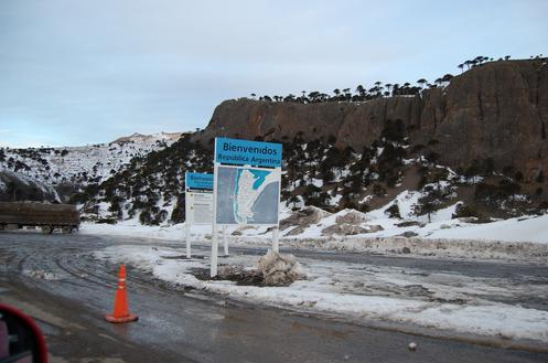 Imagen de la entrada a la aduana Argetina en Pino Hachado